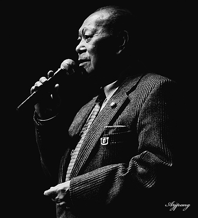 สุเทพ วงศ์กำแหง ศิลปินแห่งชาติ สาขา เพลงไทยสากล-ขับร้อง ประจำปี พ.ศ. 2533 เป็นศิลปินนักร้องเพลงไทยสากลที่มีน้ำเสียงเสนาะ จนได้รับฉายาจาก รงค์ วงษ์สวรรค์ว่า..... " นักร้องเสียงขยี้แพรบนฟองเบียร์ " มีผลงานดีเด่นเป็นเวลาต่อเนื่องมานานกว่า 40 ปี